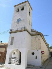 Iglesia de San Bartolome